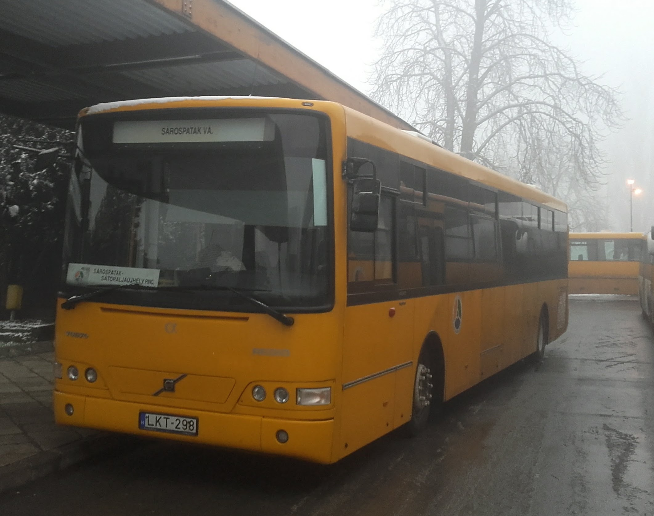 Az ÉMKK LKT-298 rendszámú Volvo Alfa Regio típusú busza Sárospatakon, a 3870-es helyközi járaton.